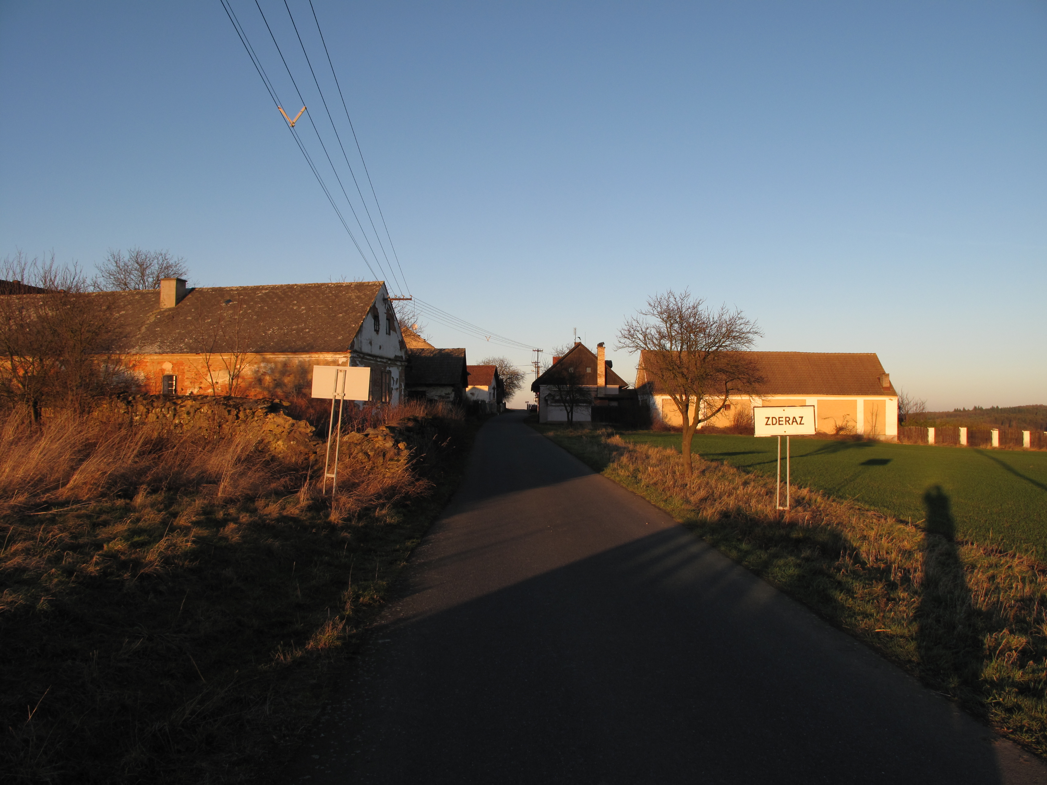 Silnice ve Zderazi. Okres Klatovy, Česká republika.